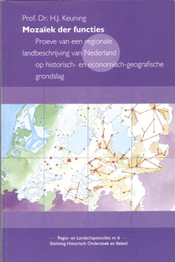 Omslag boek Mozaiek der functies, herdruk door Regio Projekt Groningen